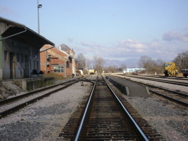 Željeznički kolodvor Gospić na ličkoj pruzi